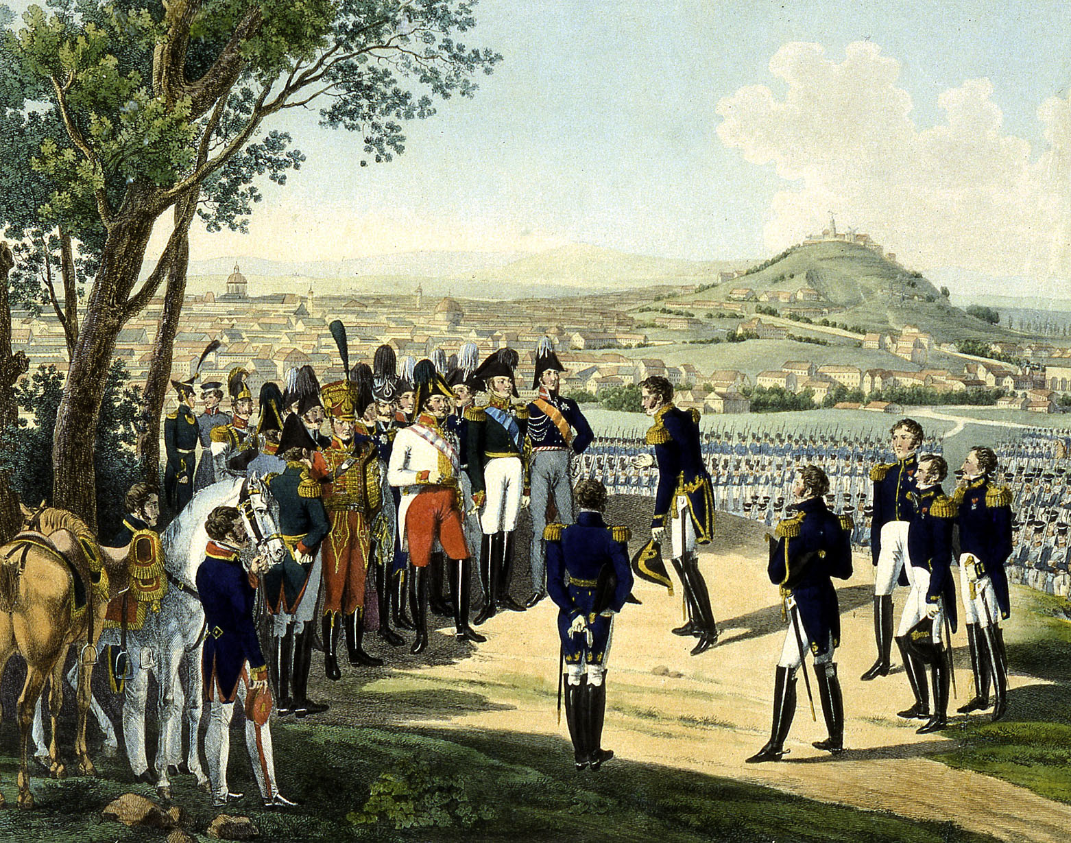 Кульминация правления Александра I: маршал Мармон вручает ключи от Парижа российскому императору